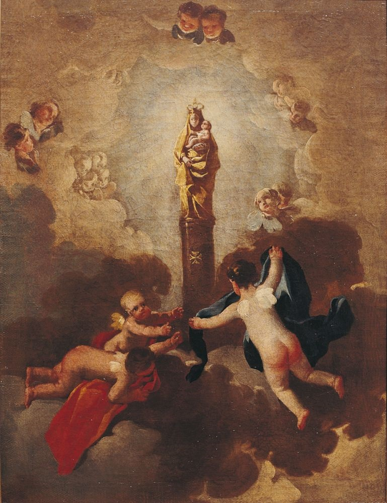 La obra representa a la Virgen del Pilar, patrona de Spain.